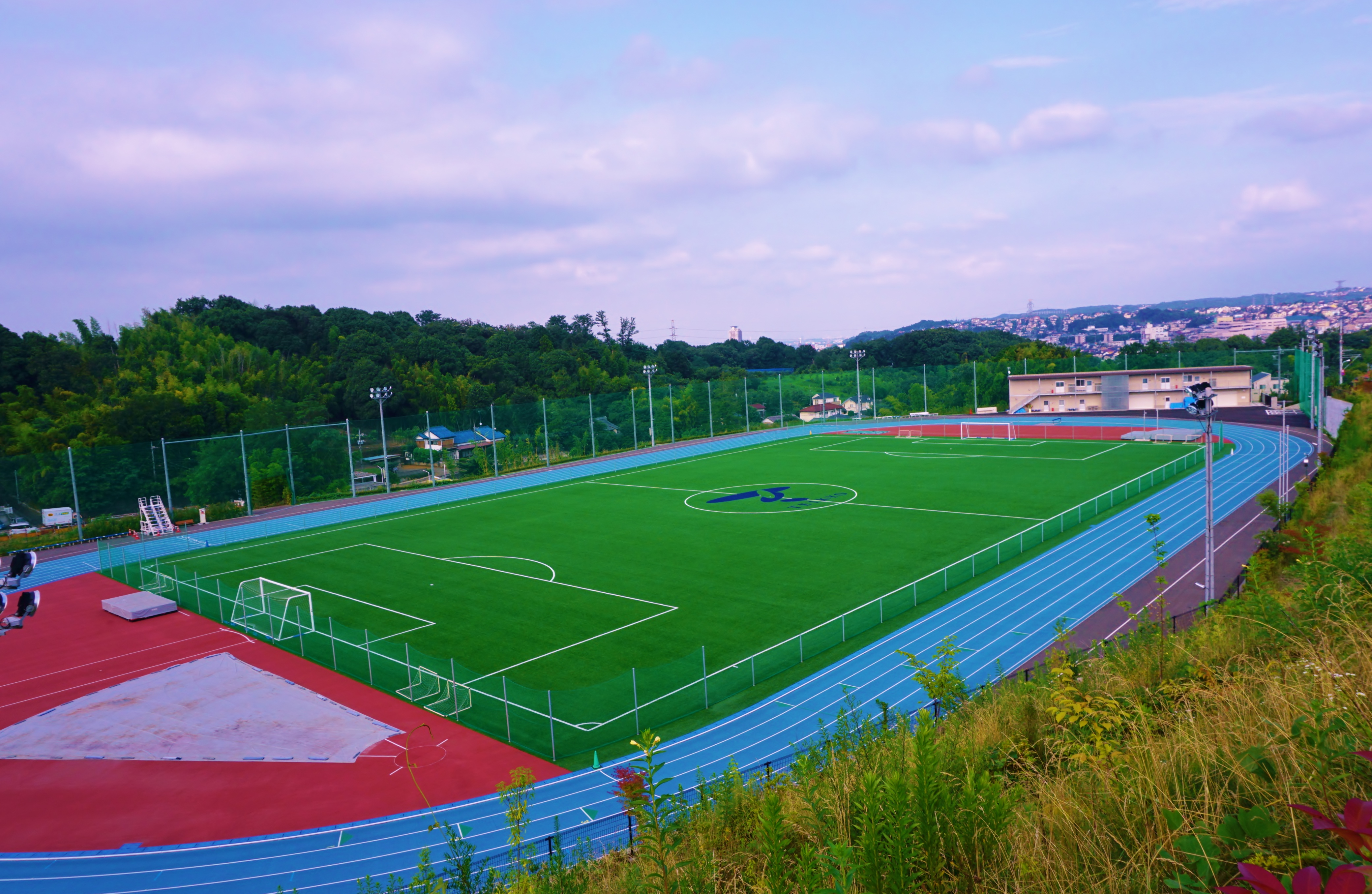 2015年竣工の陸上競技場